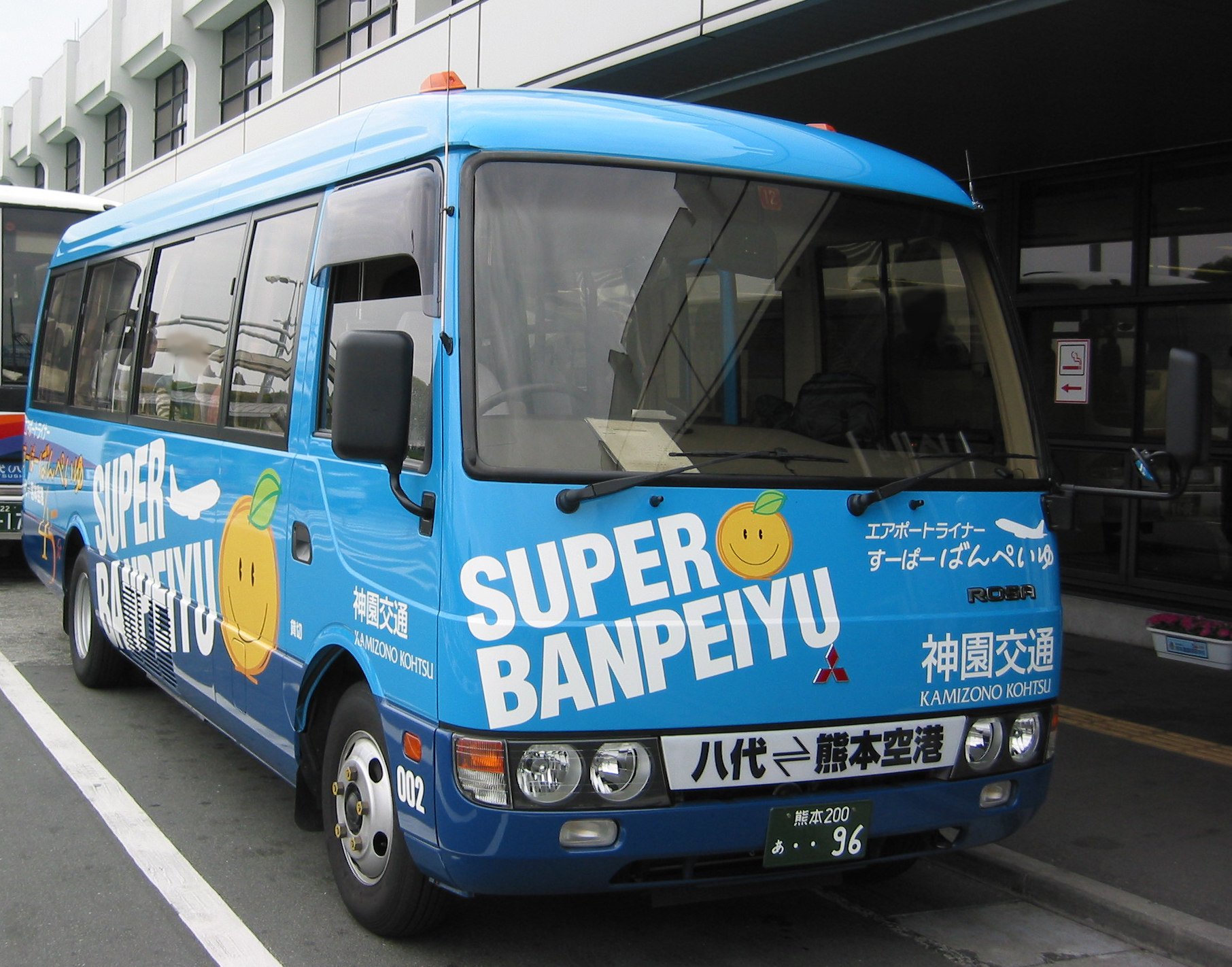 神園交通 空港バス「すーぱーばんぺいゆ」の車両